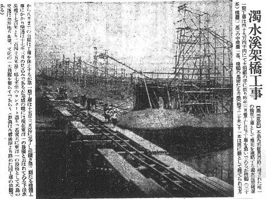 如圖文所示。翻攝自《臺灣日日新報》。